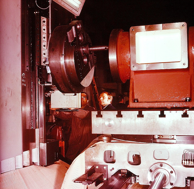 Original image description from the Deutsche Fotothek Maschinenbauer